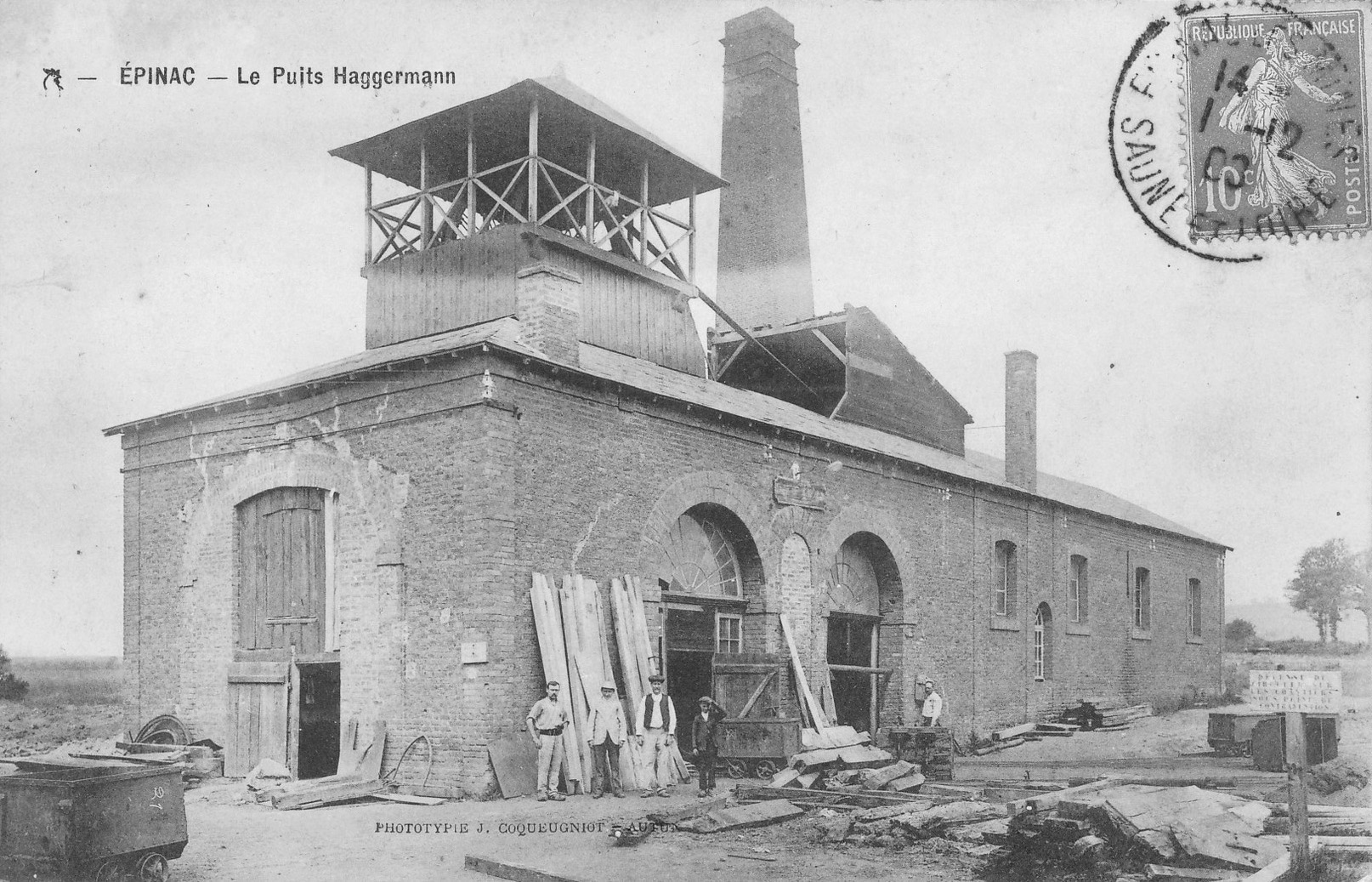 Le puits Hagerman (Houillères d’Épinac, France).